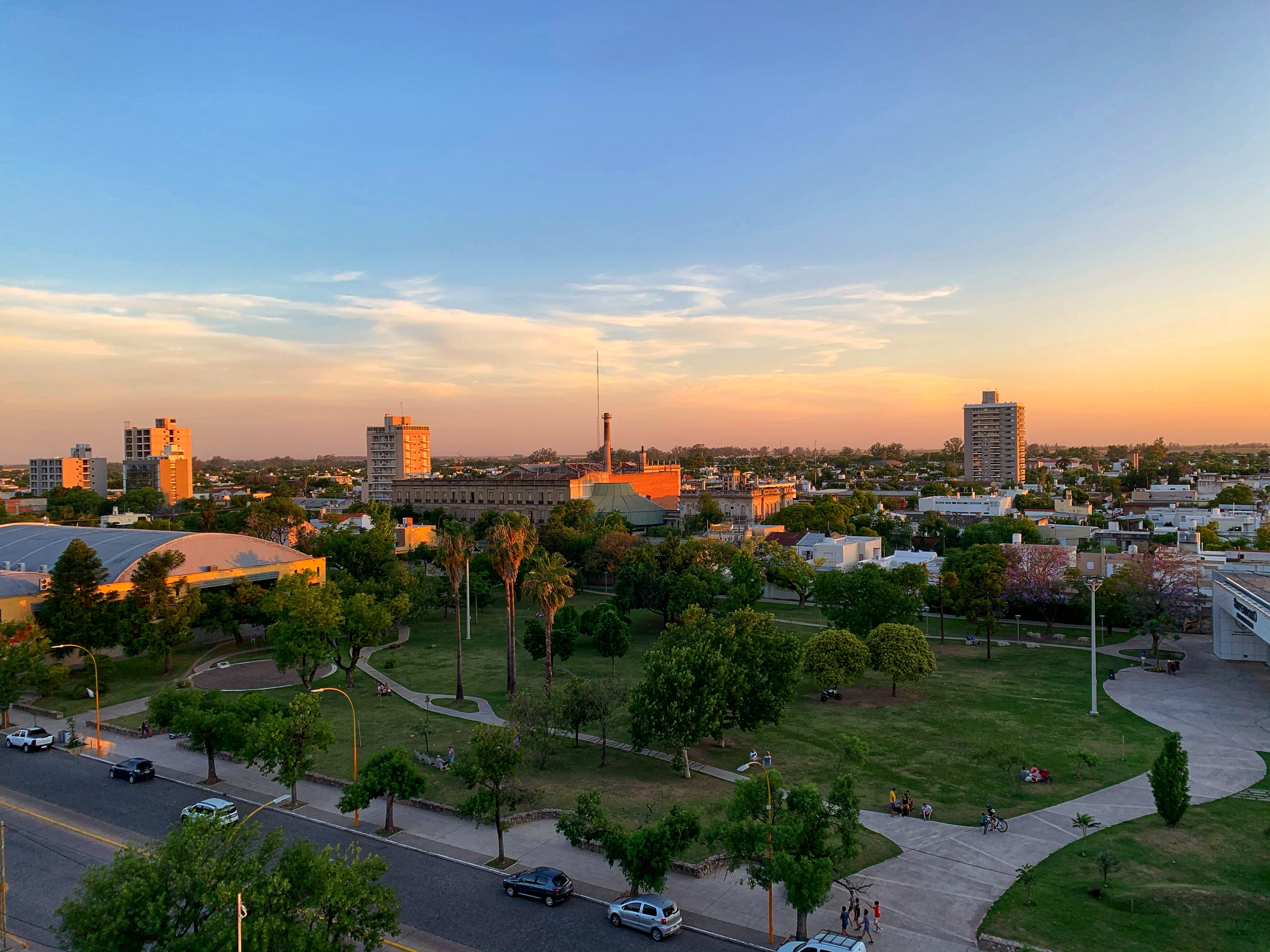 Vista del Jardín Botánico luego de las refacciones por la construcción del Superdomo Municipal y el paso del tornado del año 2018.